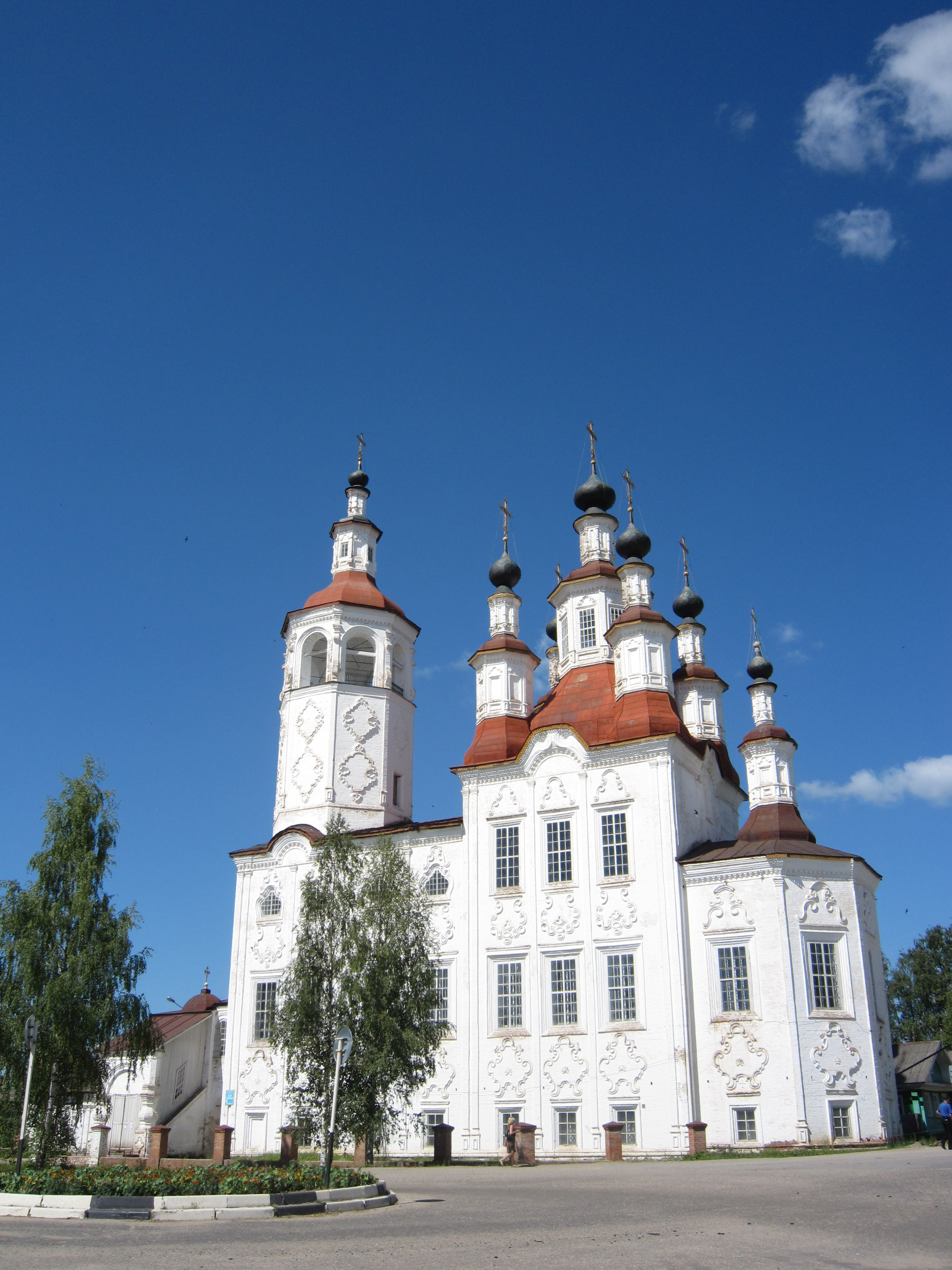 Входо-Иерусалимская церковь в Тотьме.